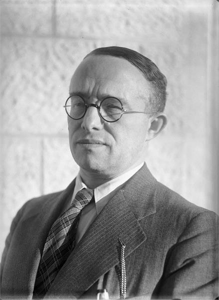 .פרופ' לזרסון